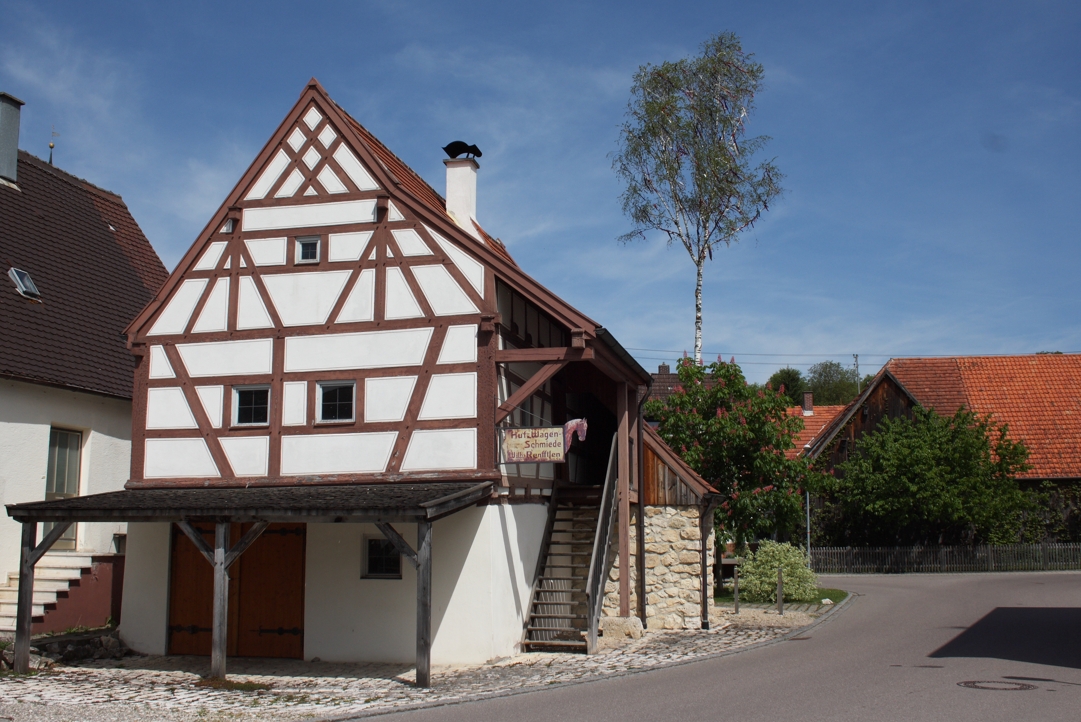 Ehemalige Schmiede in Haunsheim, einer Gemeinde im Landkreis Dillingen an der Donau (Bayern)